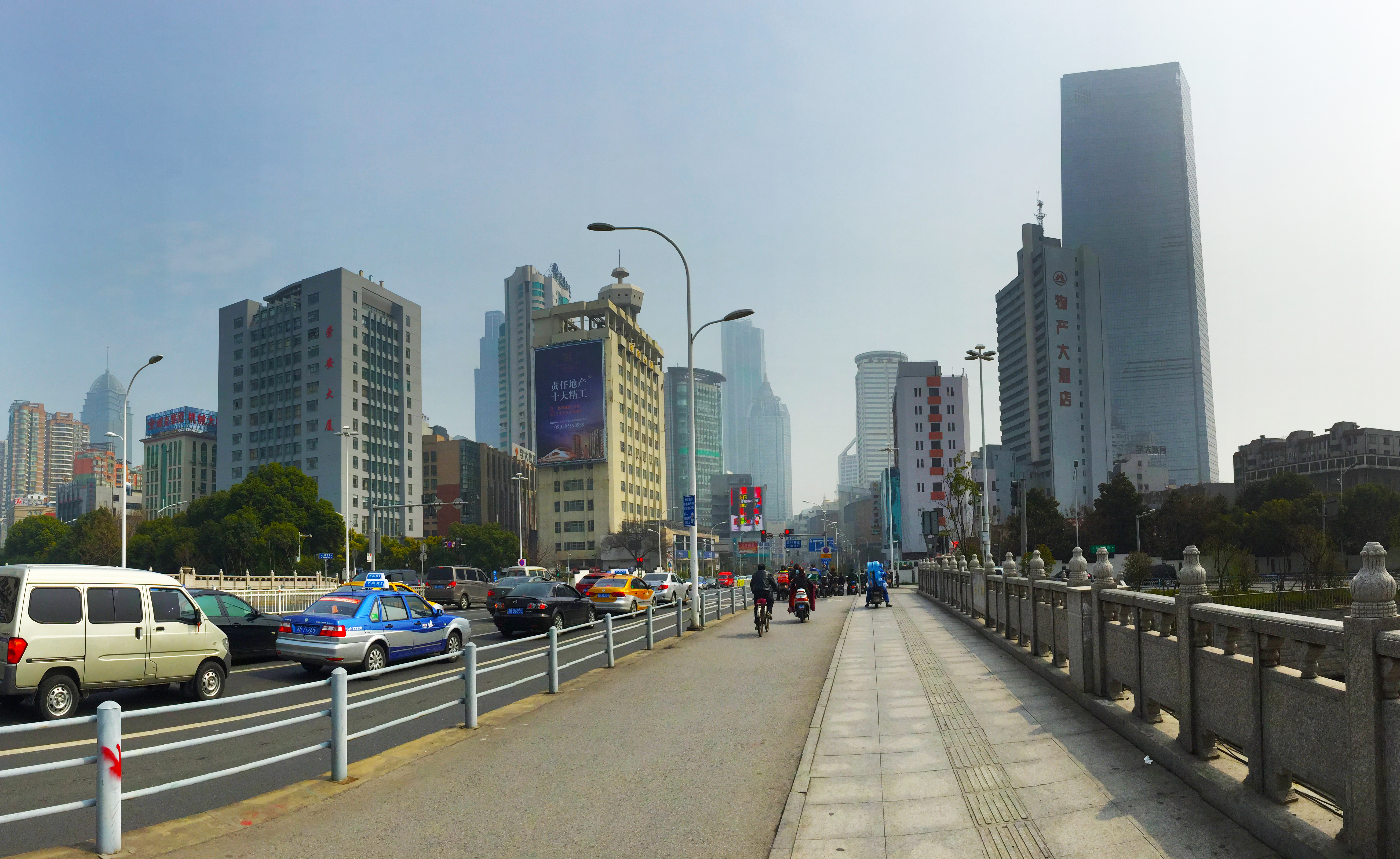 無錫西門橋